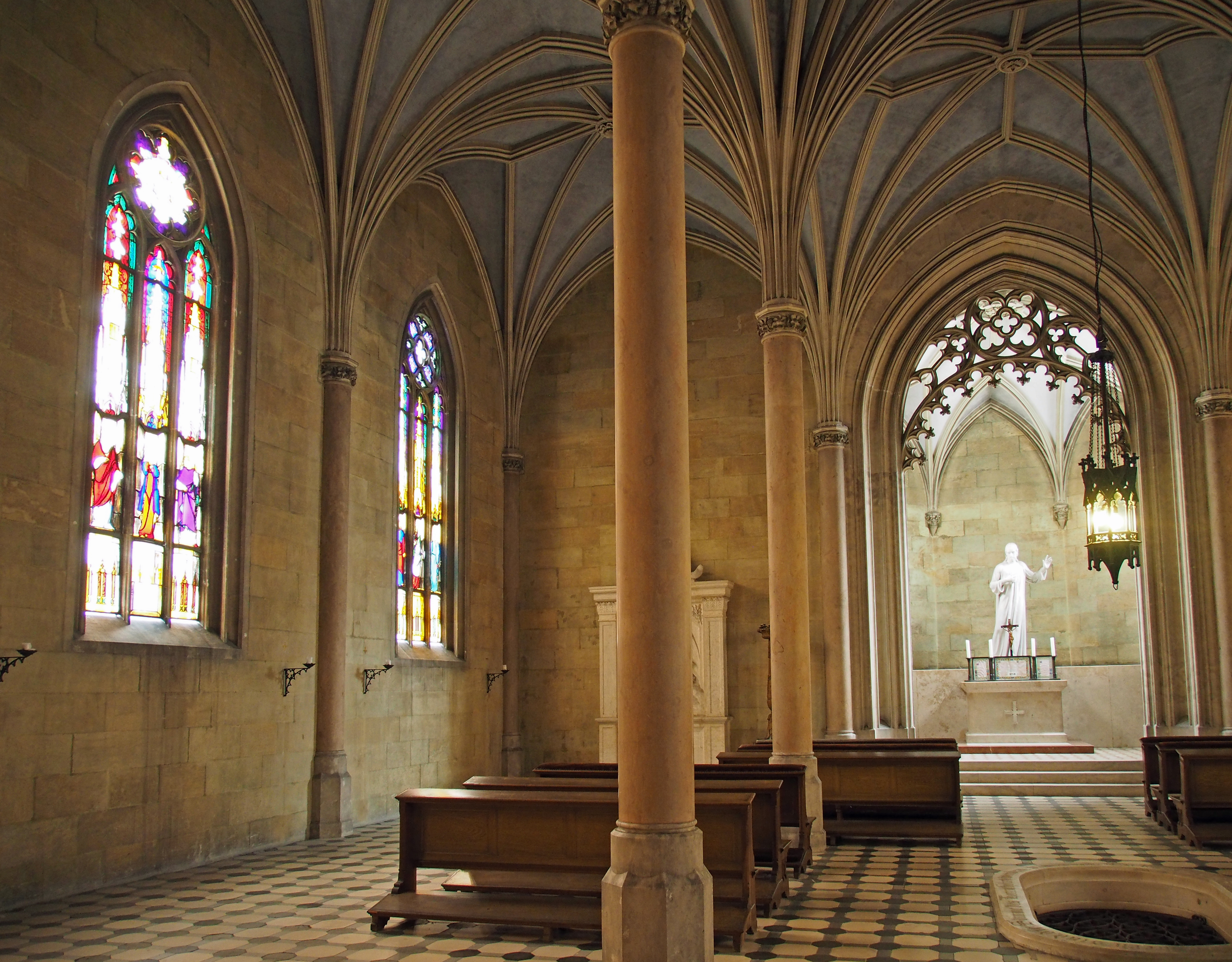 Gruftkapelle Kloster St. Emmaram